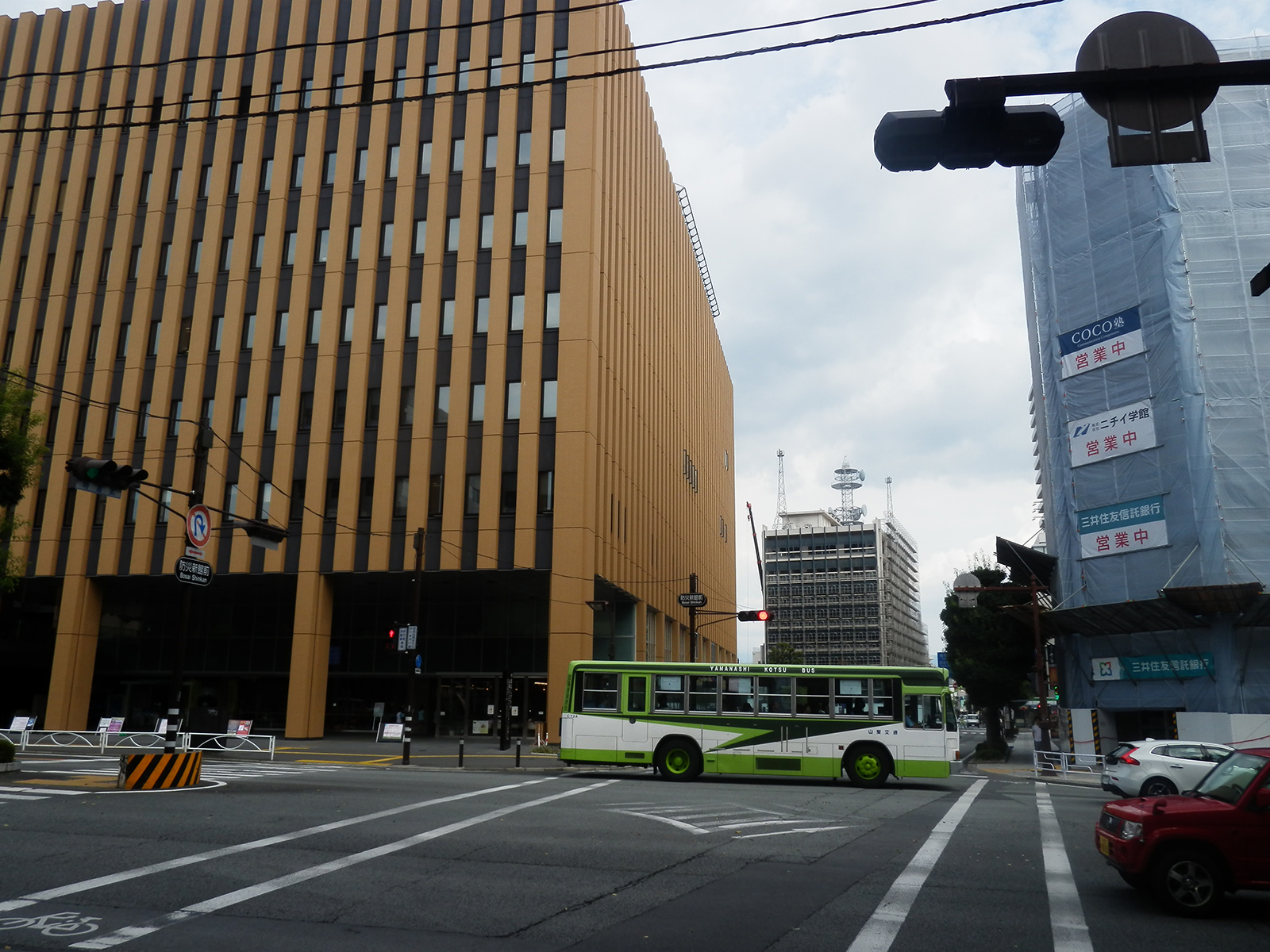 山梨県庁舎防災新館と解体中の山梨県民会館